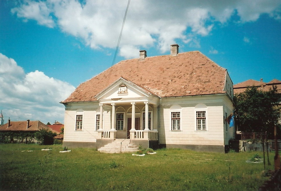 Betegh-kúria, Gyéresszentkirály (ma Aranyosgyéres, Câmpia Turzii, Kolozs m., Románia), Str. Teilor 10. sz.